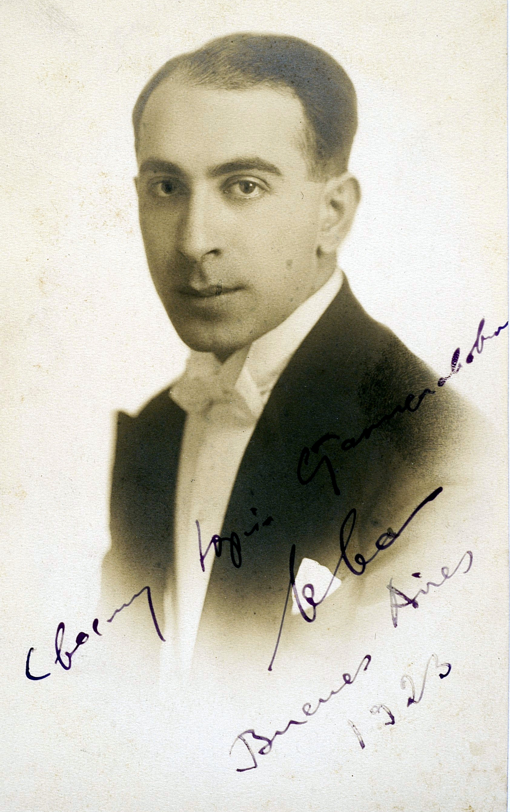 Leo Podolsky